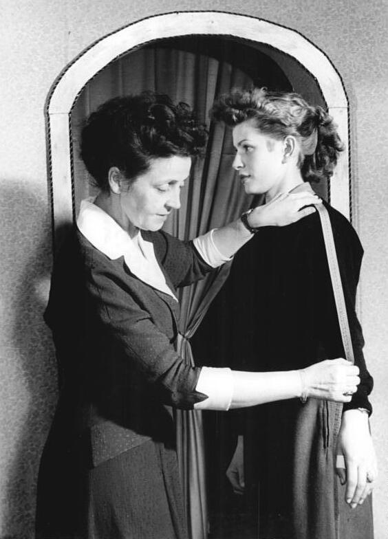 Zentralbild-Schutt Zi-Noa 27.11.1956 Zuschneidewerkstatt des Industrieladens am Altmarkt in Cottbus waltet Fräulein Pustal mit geschickten Händen. Erst wird ausgesucht, dann gemessen, und binne kurzem kann man sich das zugeschnittene Kleid, die Bluse oder den Rock abholen. UBz: Kollegin Pustal nimmt bei einer Kundin Maß.